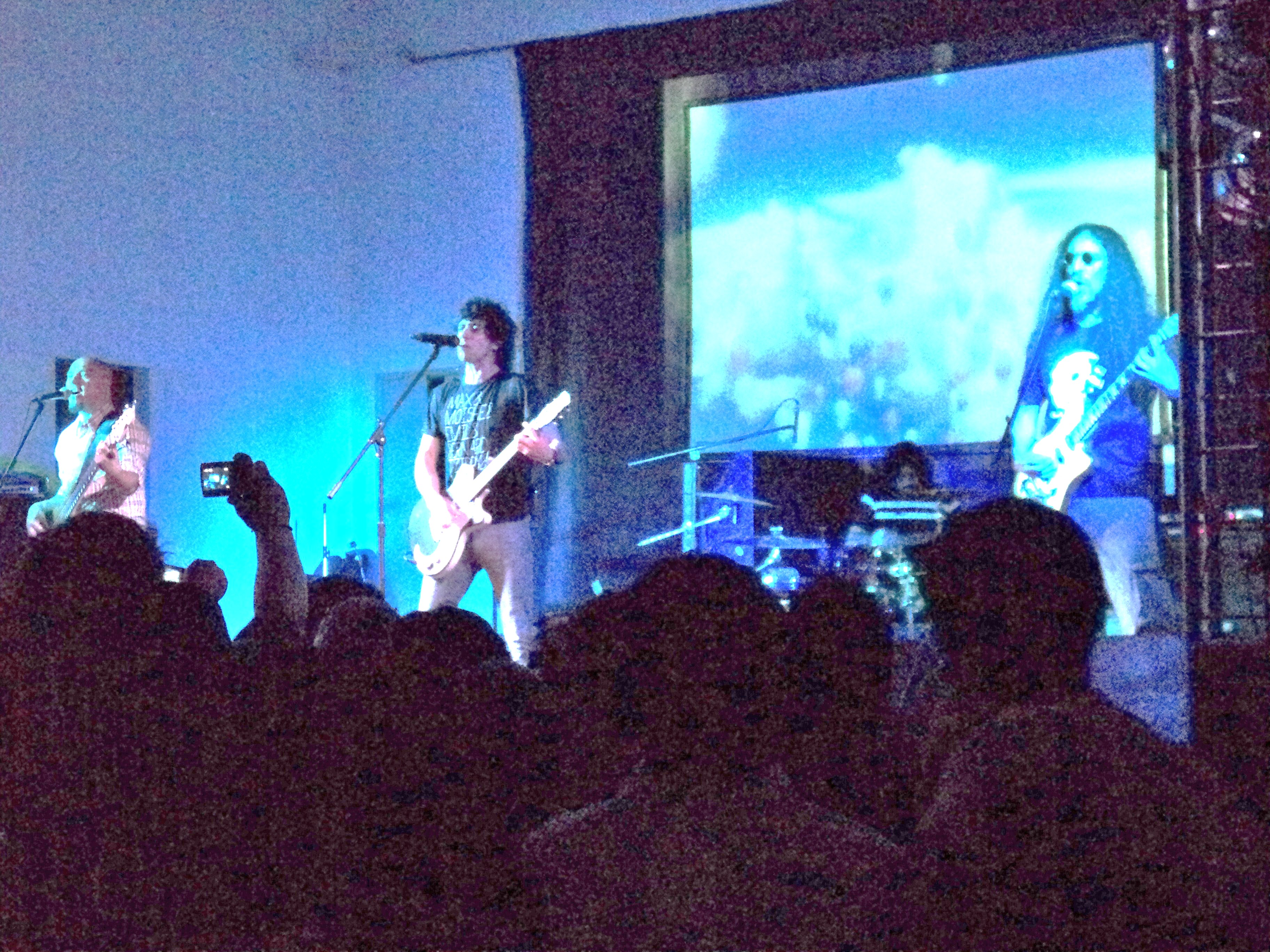 la banda den 2011 en un recital de Comodoro Rivadavia